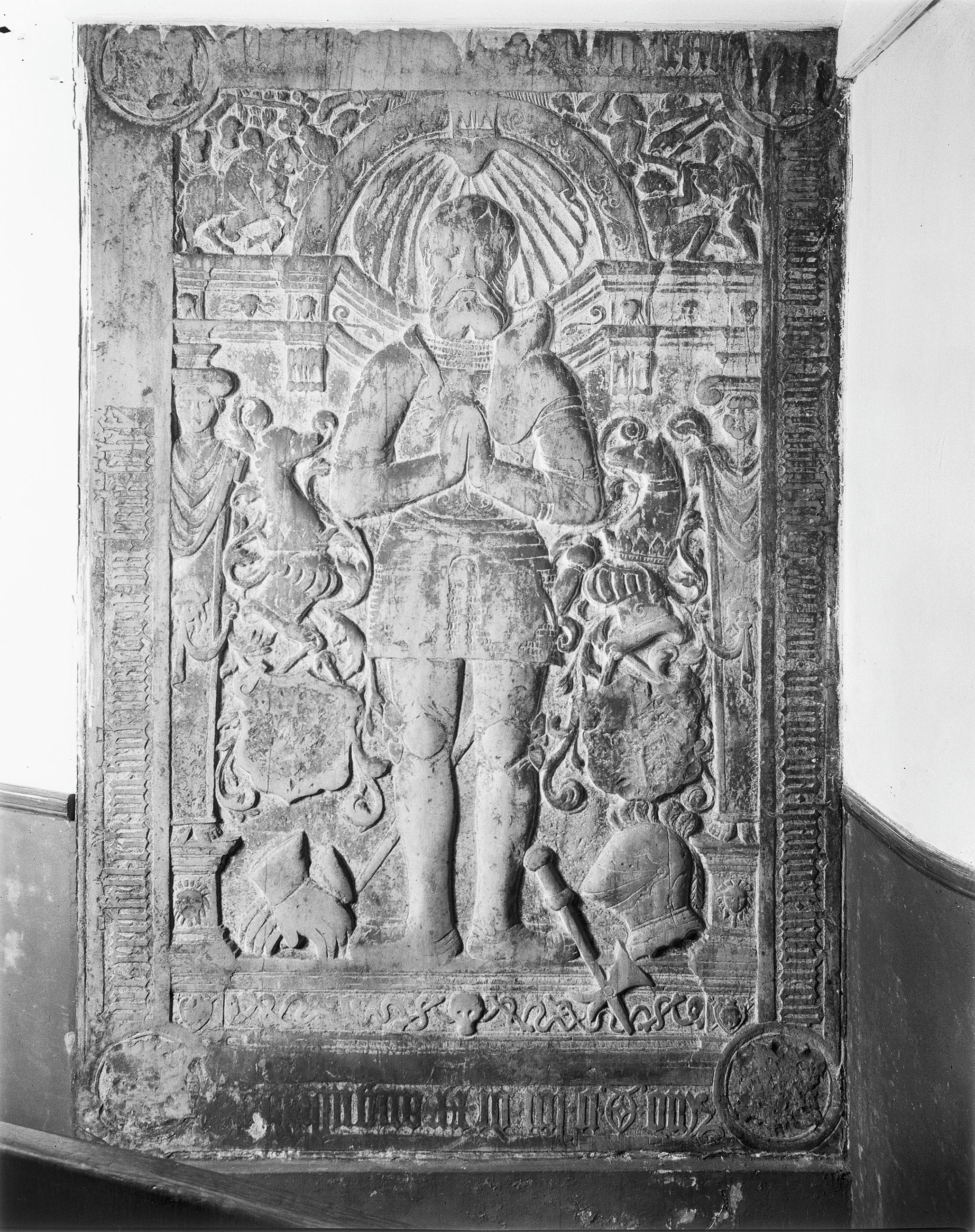 Nederlands Hervormde Kerk: zerk van Berend van Haakfort